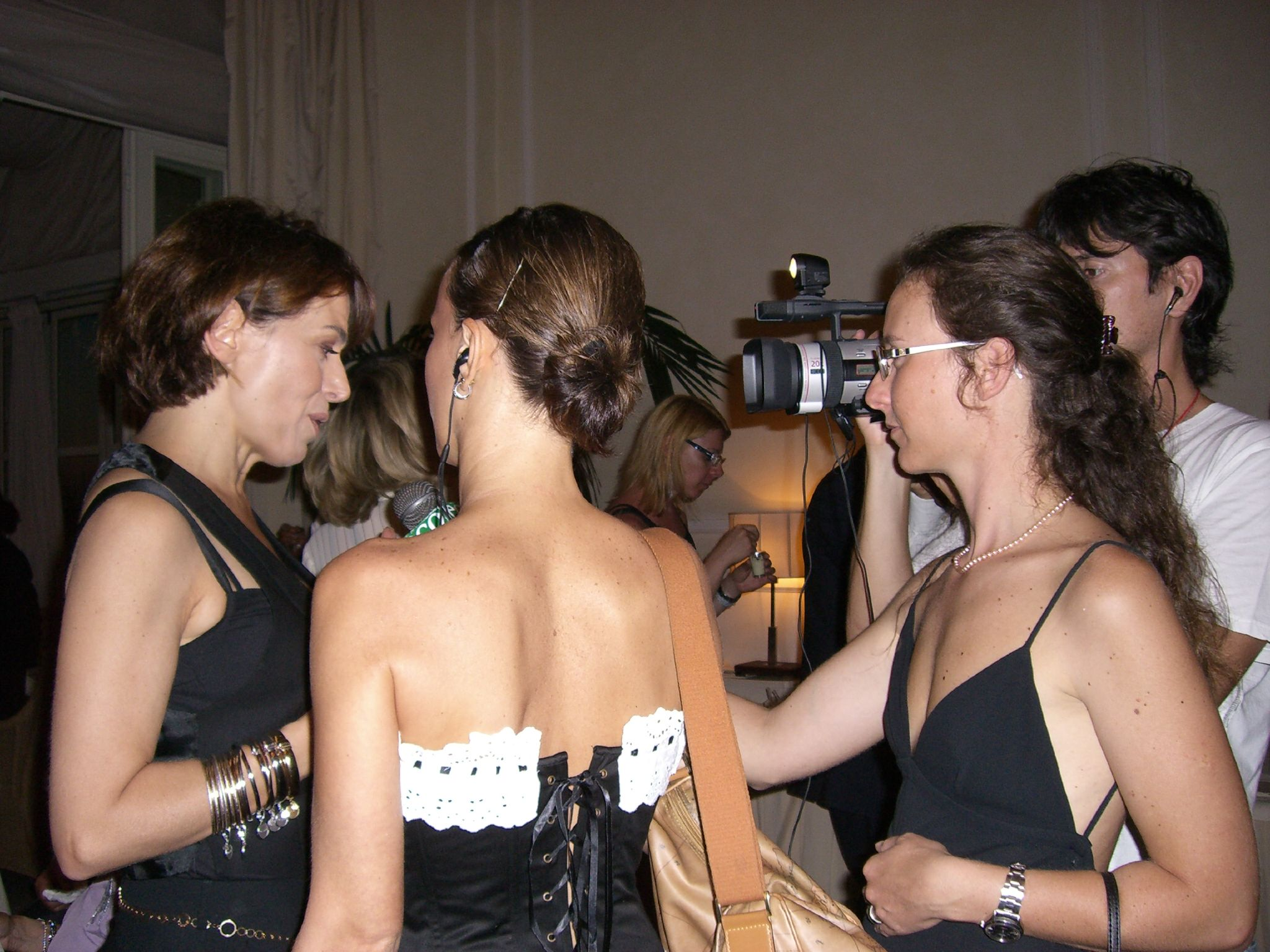 La presentatrice televisiva ed attrice italiana Barbara D'Urso